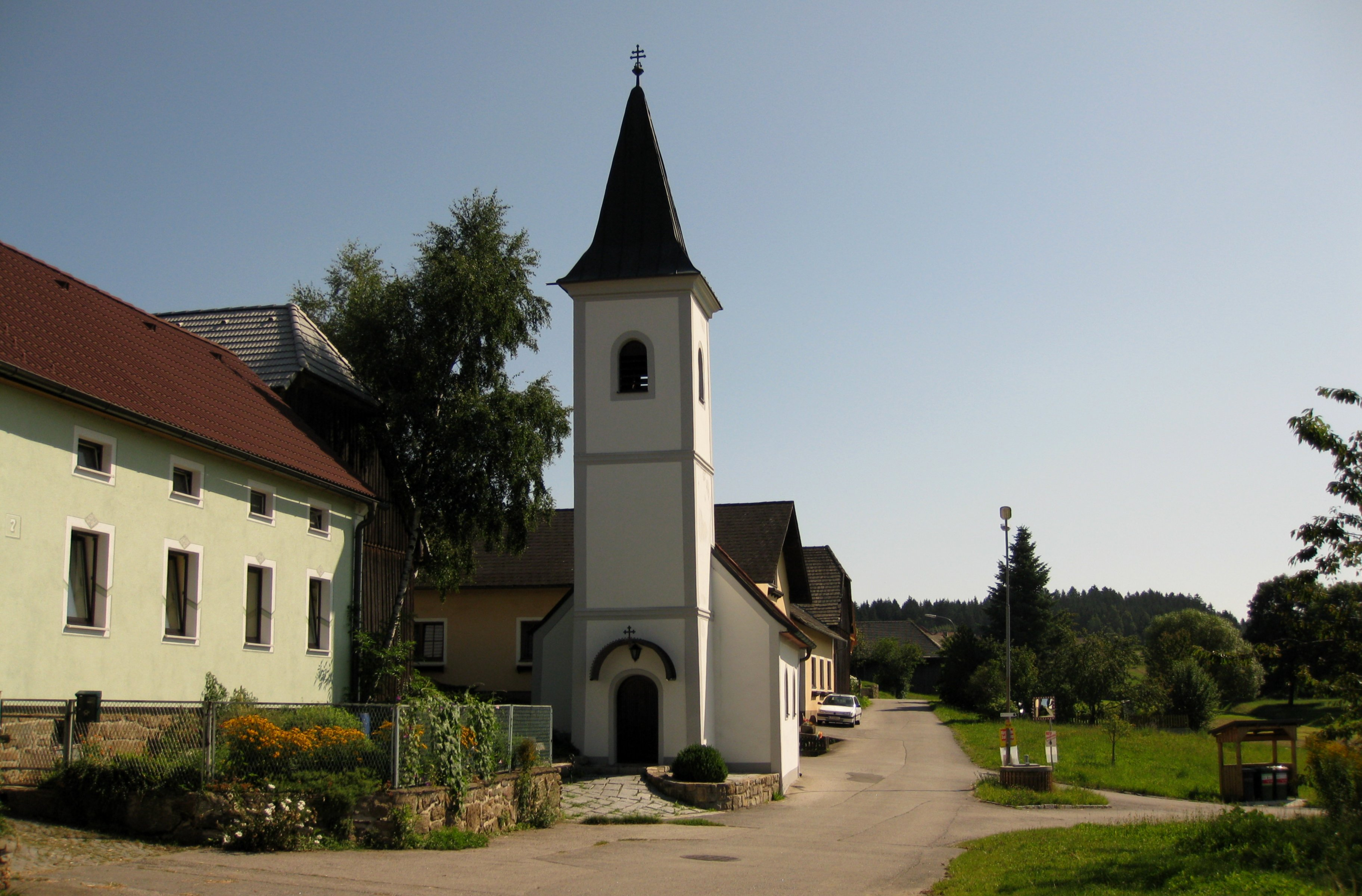 Ortskapelle Frankenreith